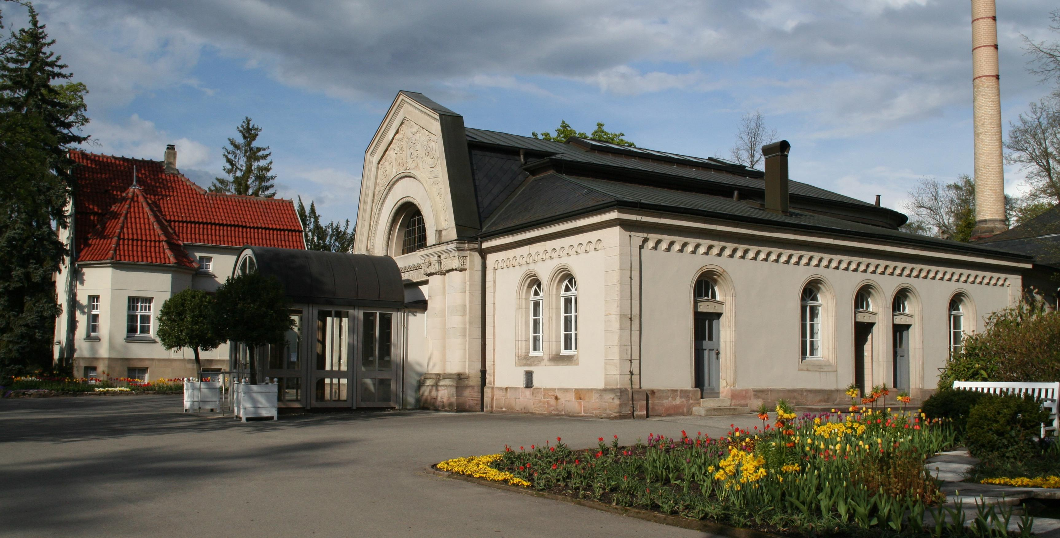 Trauerhalle des Friedhofes am Glockenberg, Coburg